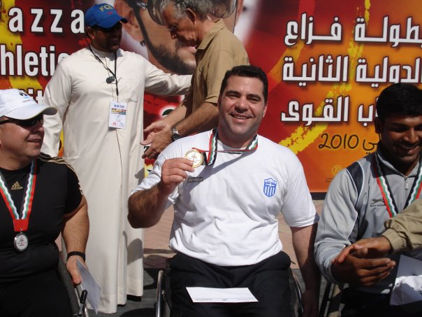 ΑΓΩΝΕΣ DUBAI